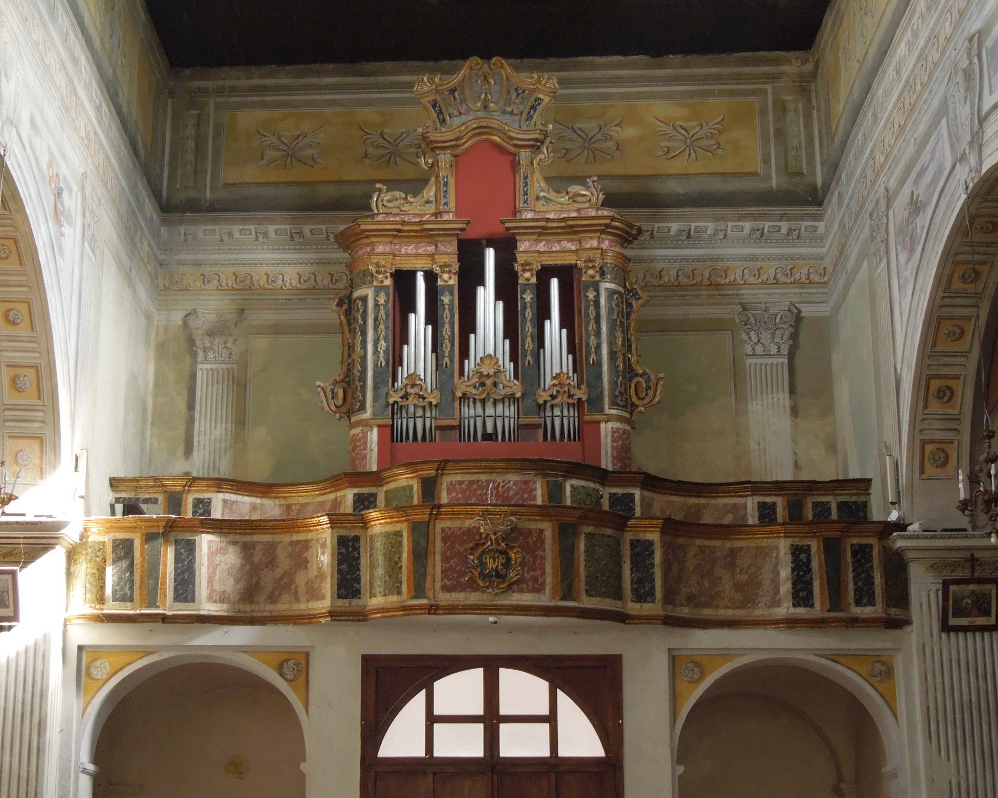 Organo della Chiesa di Santa Maria in platea di Campli in provincia di Teramo. Immagine scattata nell'anno 2014.